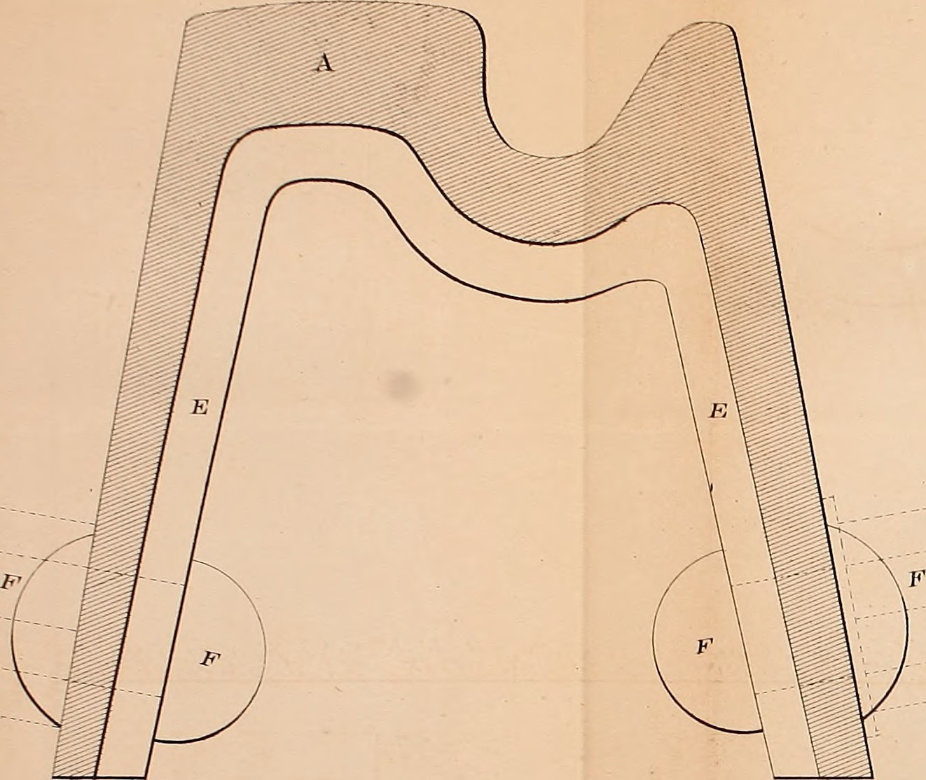 Title: Anales de la Sociedad Científica Argentina Identifier: analesdelasocied71879soci Year: 1876 (1870s) Authors: Sociedad Científica Argentina; Congreso Científico Latino Americano; Congreso Científico Internacional Americano Subjects: Sociedad Científica Argentina; Science Publisher: Buenos Aires [Sociedad Científica Argentina] Text Appearing Before Image: ^'orto Trasvors.il dollUol Loatíriii« sepun X.Y. Text Appearing After Image: VIA BELGA DÉLAS FABRICAS DEMERBE YCÍ^ EN JEMMAPES Kmplinida porltt ('omii'; LACROZE H?f Cortf L iiói(u(Un,il